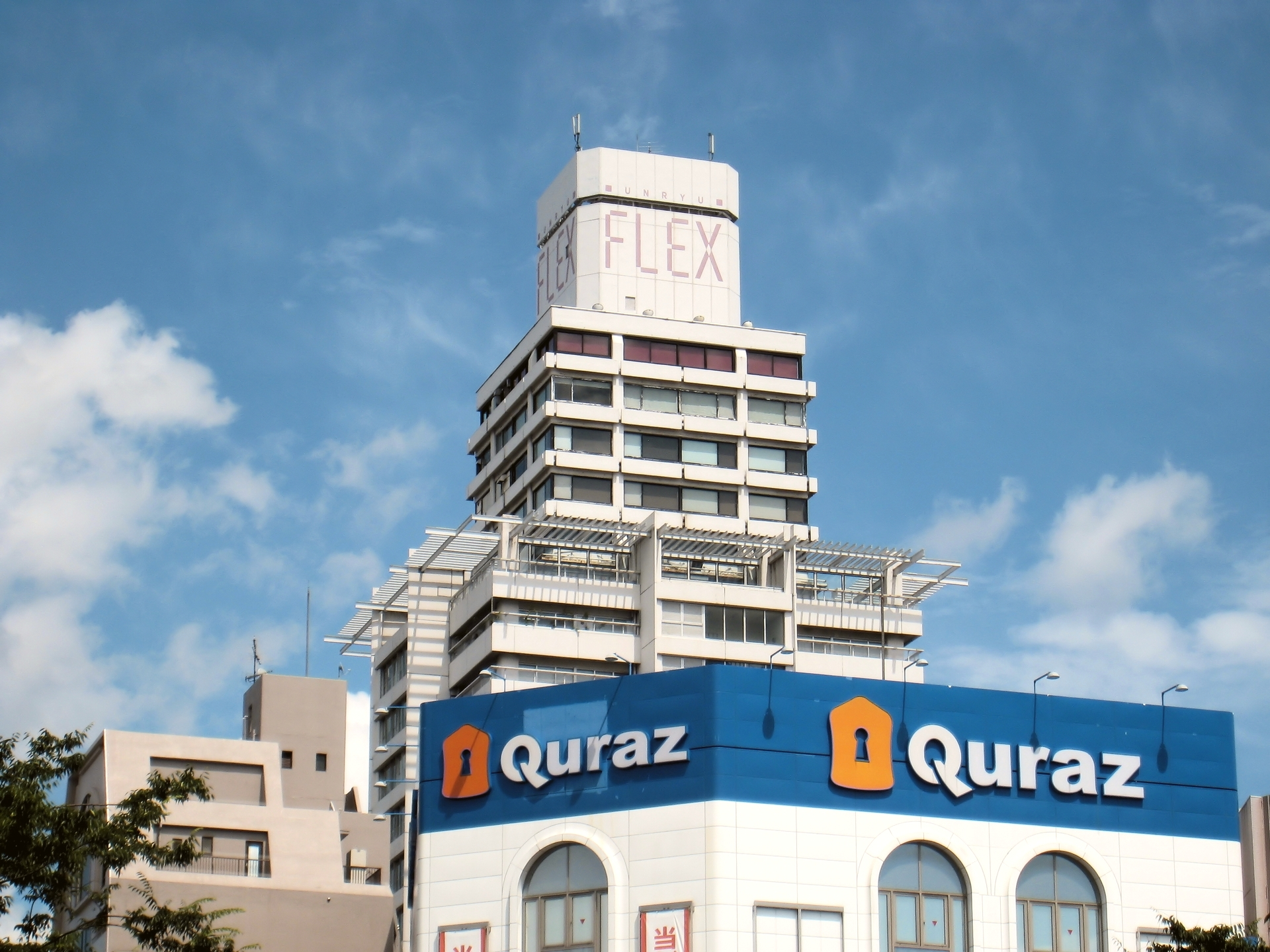 雲竜フレックスビル